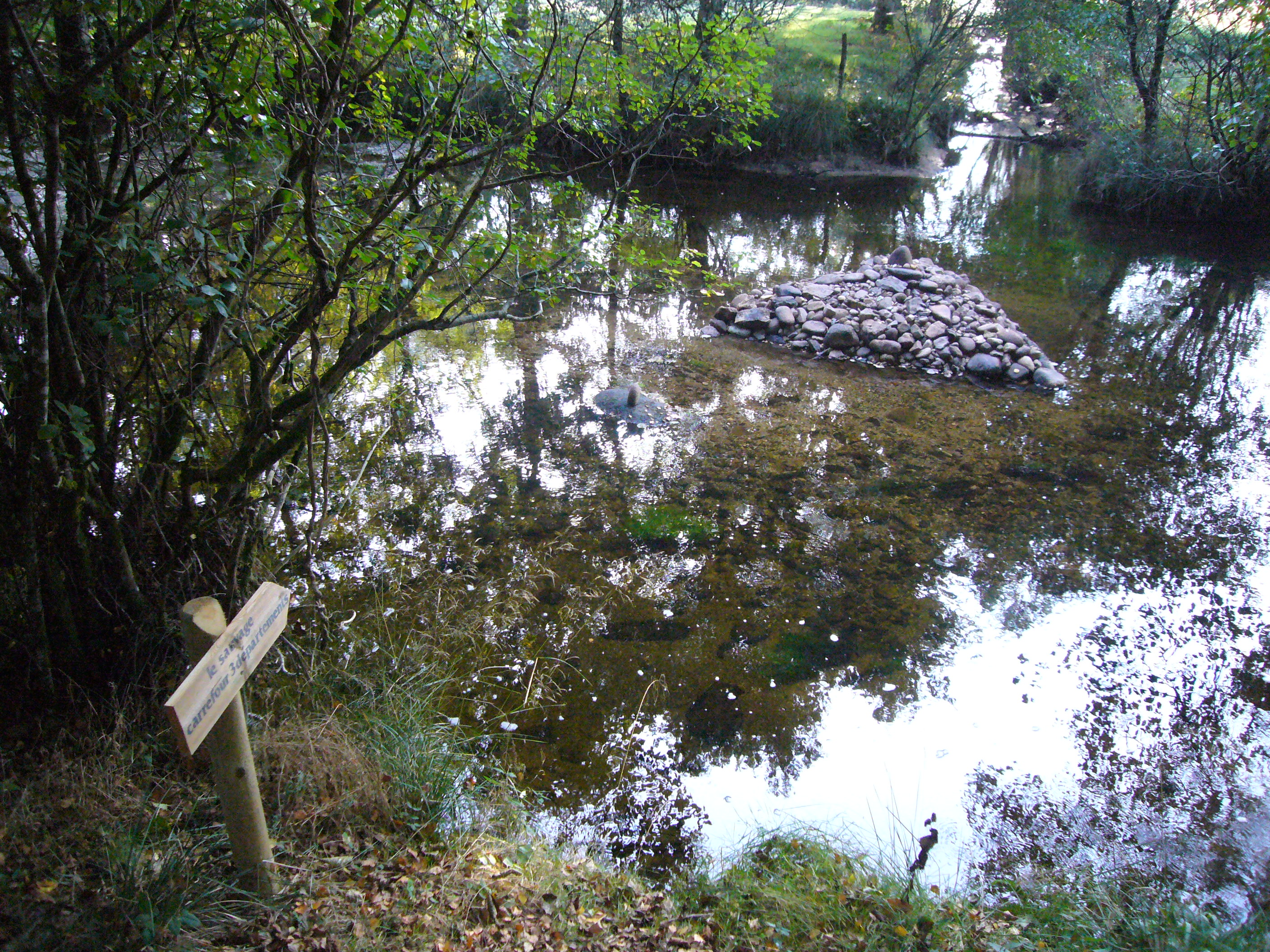 Amas de pierres, appelé "le Sauvage", situé à 537 m. d'altitude et matérialisant le carrefour des limites des trois départements du Limousin : Haute-Vienne (commune de Rempnat) à l'endroit d'où est prise la photo ; et de l'autre côté de la rivière Vienne : Corrèze (commune de Tarnac) à droite du ruisseau et Creuse à gauche (commune de Faux-la-Montagne).